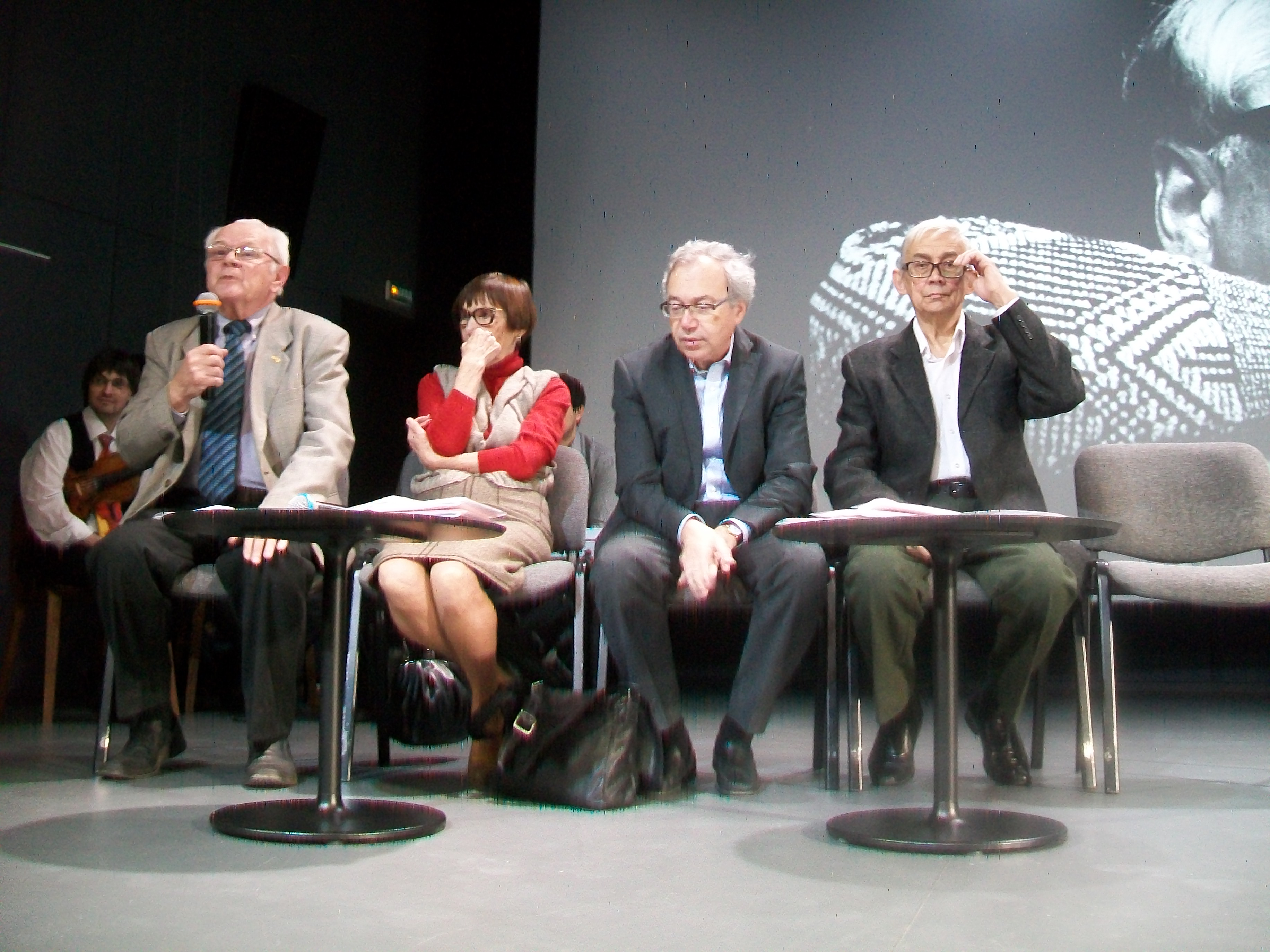 Ветераны Свердловской городской дискуссионной трибуны в Ельцин-центре - Лукьянин (крайний слева с микрофоном), Закс (третий слева). Ельцин-центр, заседание к юбилею трибуны, 24 мая 2017 года